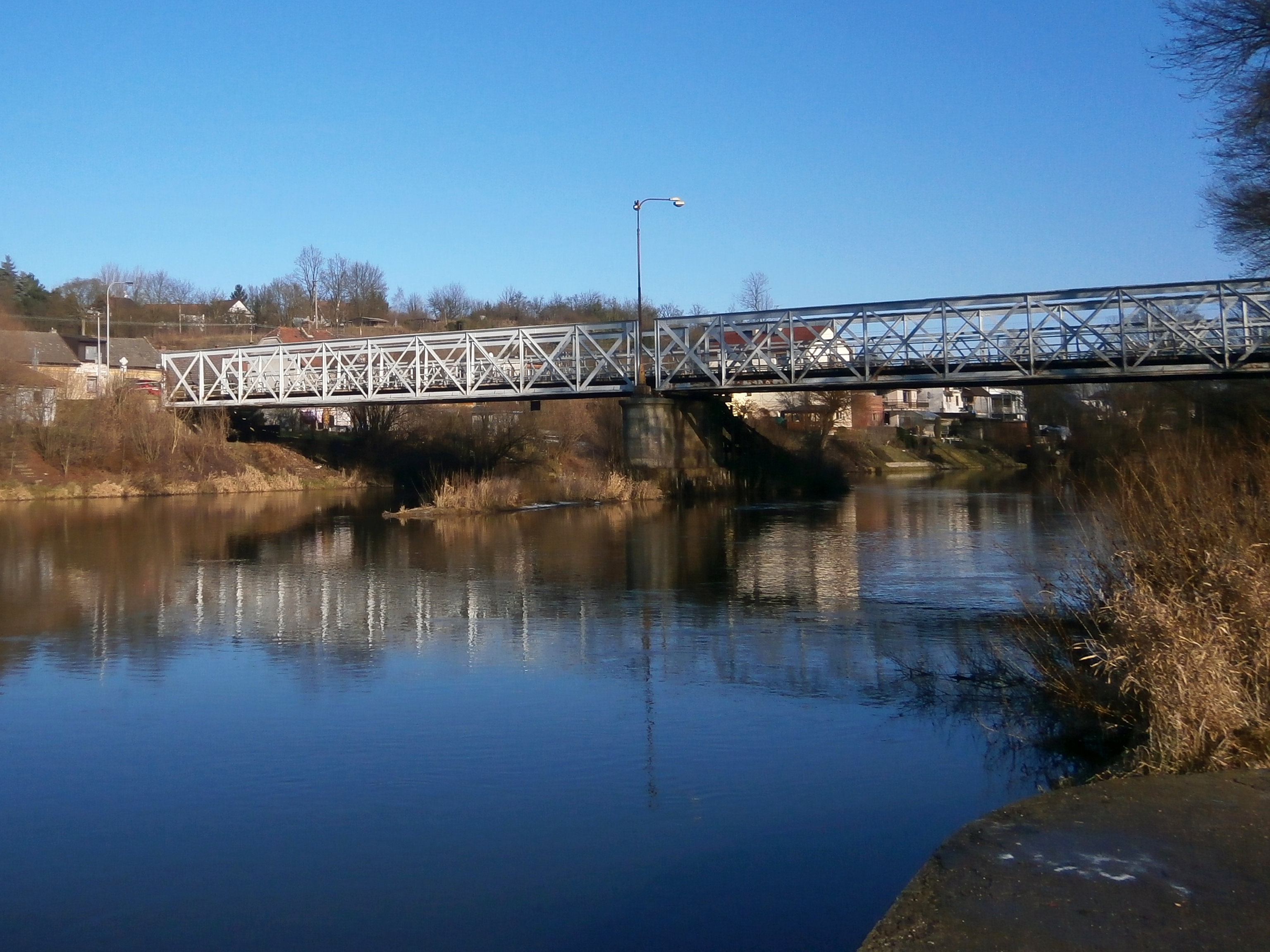 Most plk. Šrámka mezi Svinárkami a Svinarami